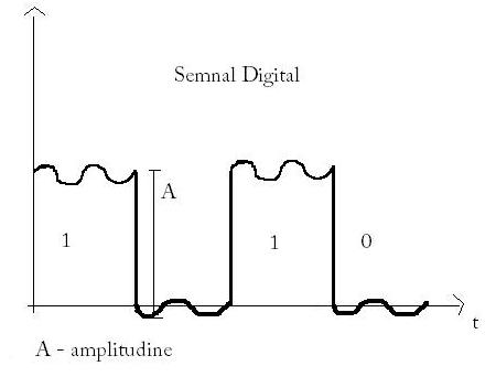 Semnal Digital reprezentare schematica